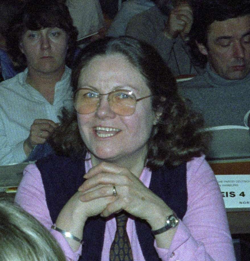 Porträt Inge Kazamel, MdHB